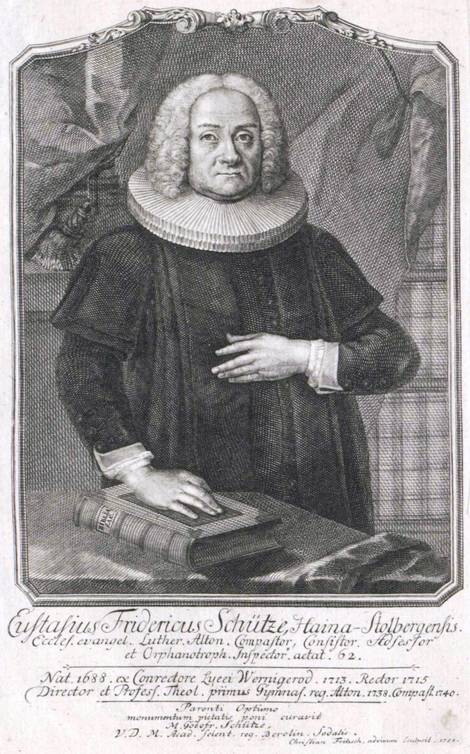 Eustasius Friedrich Schütze (1688-1758) Kuperstich (18. Jahrhundert) von Christian Friedrich Fritzsch